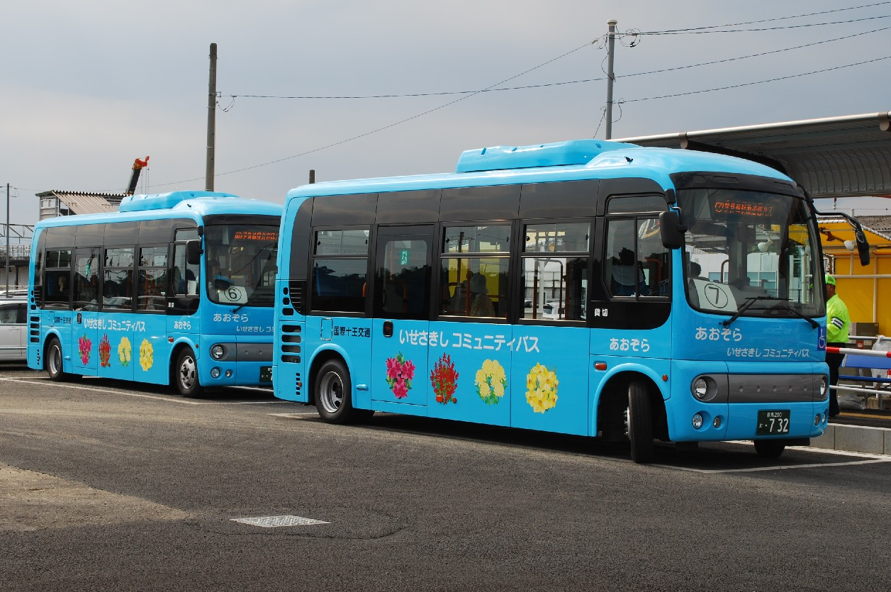 国際十王交通伊勢崎営業所群馬200か732他。伊勢崎市コミュニティバス「あおぞら」専用車。伊勢崎駅前の公道上より撮影。